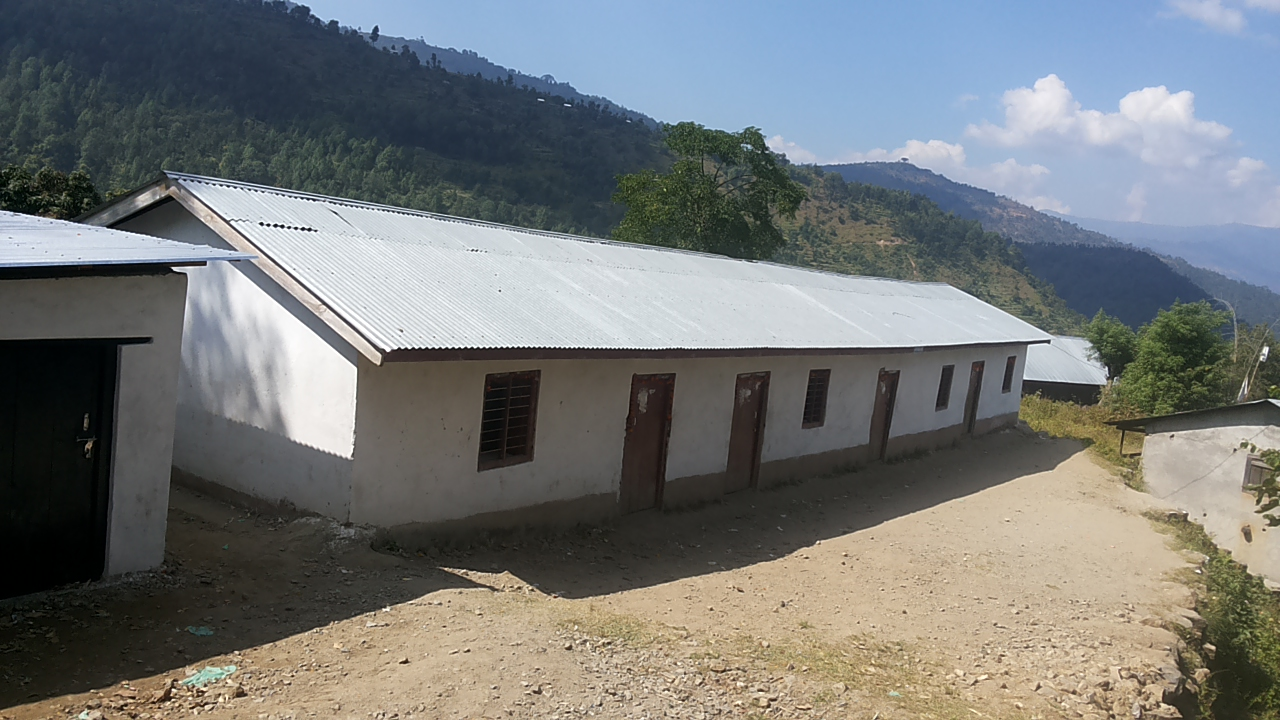 नेपाली: अठारसय माध्यमिक विद्यालय धनकुटा जिल्लाको बसन्तटार गाविसमा पर्दछ ।